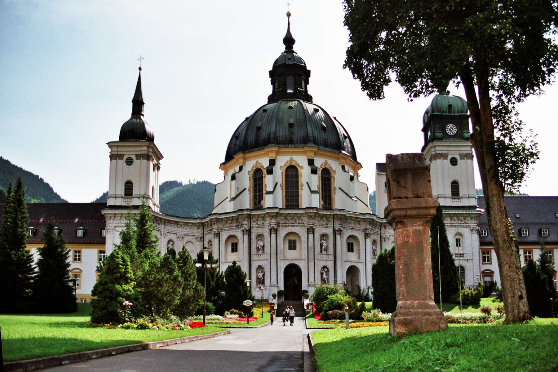 Kloster Ettal, Klosterkirche